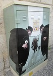 Customisation d'un Poste Détente Gaz - Ville d'Angoulême